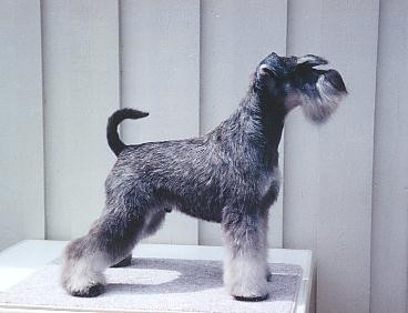 Dog, Miniature Schnauzer, Salt/Pepper